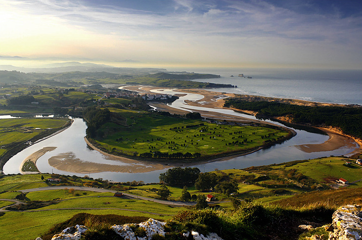 Desembocadura del río Pas vista desde el alto del monte Picota, en Liencres (Cantabria, España).